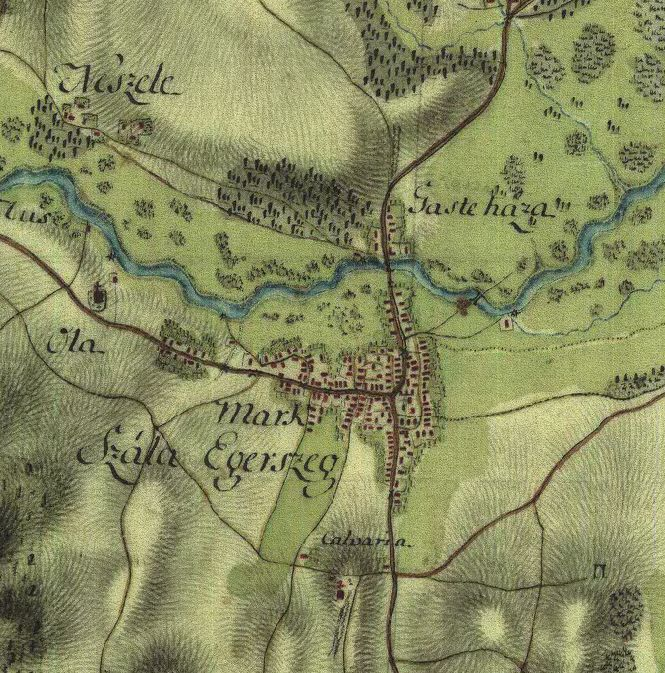 Zalaegerszeg az első katonai felmérés idején